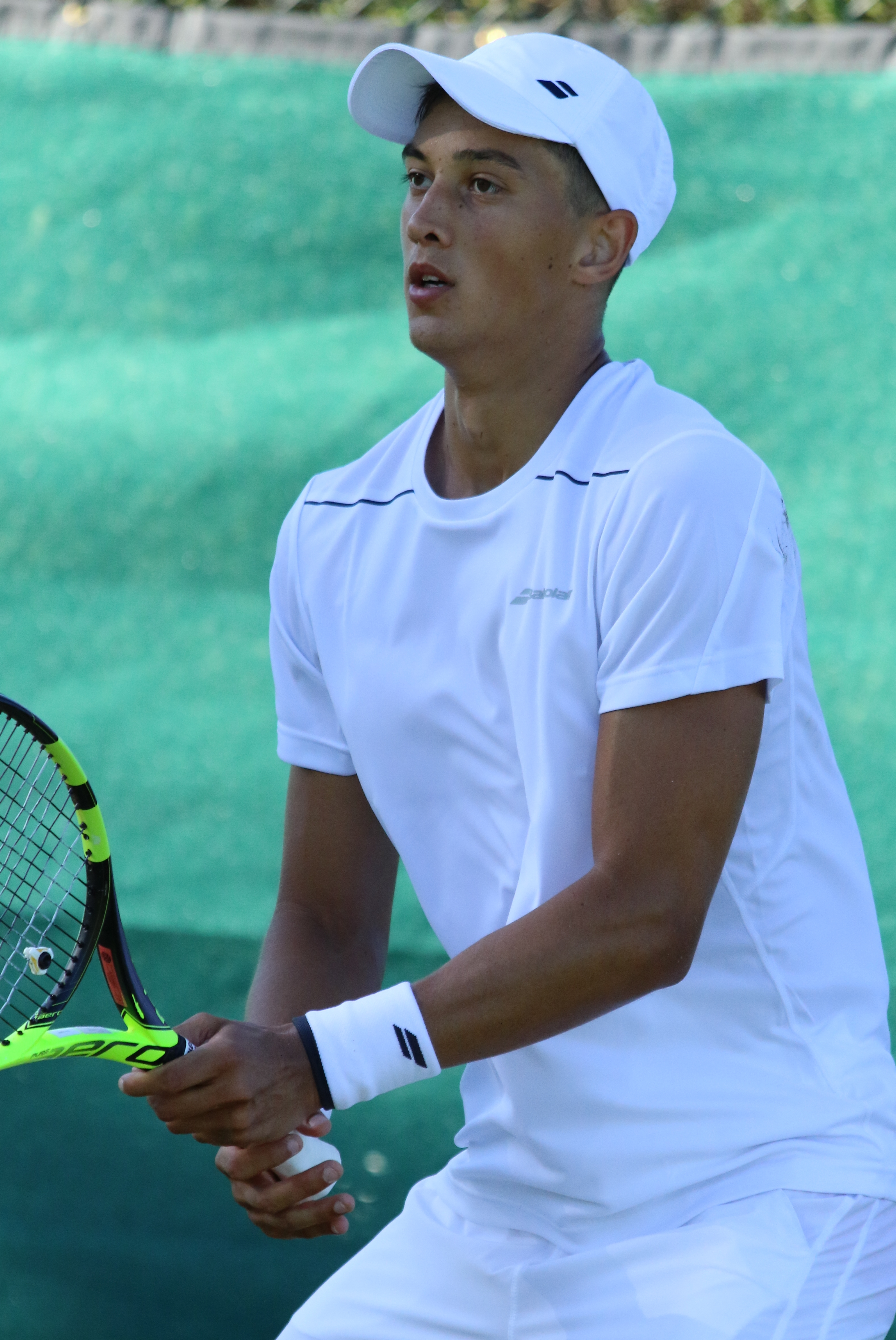 Hoang WMQ18 (33)